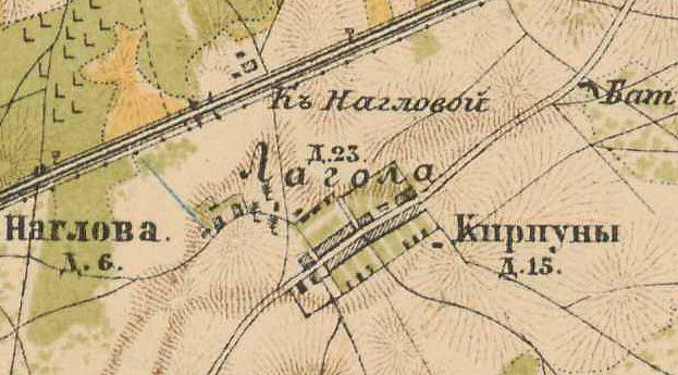 Деревня Лаголово на карте 1885 года.